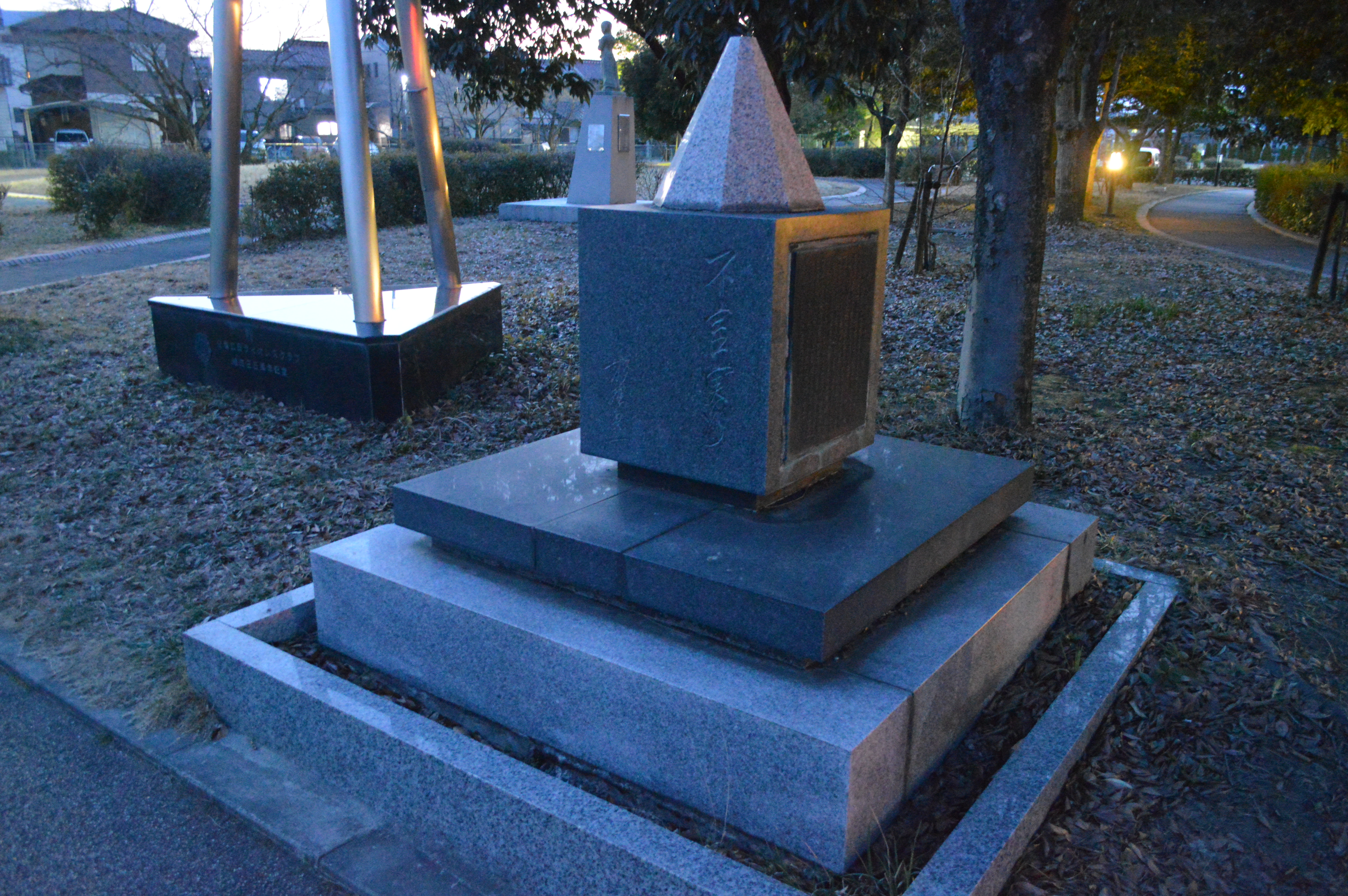 愛知県愛西市の愛西市中央図書館の屋外にある杉野繁一の記念碑。